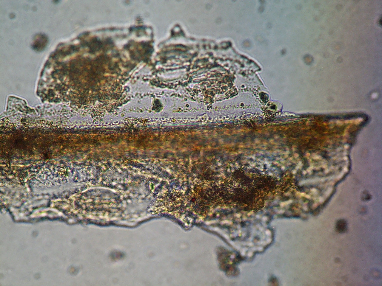 FR:Description Photographie au microscope d'un phytolithe (cellule stomatique) Photographe: Henri-Georges NATON Source: importé par le photographe Préparation des phytolithes : Claire Delhon Licence: GFDL-self